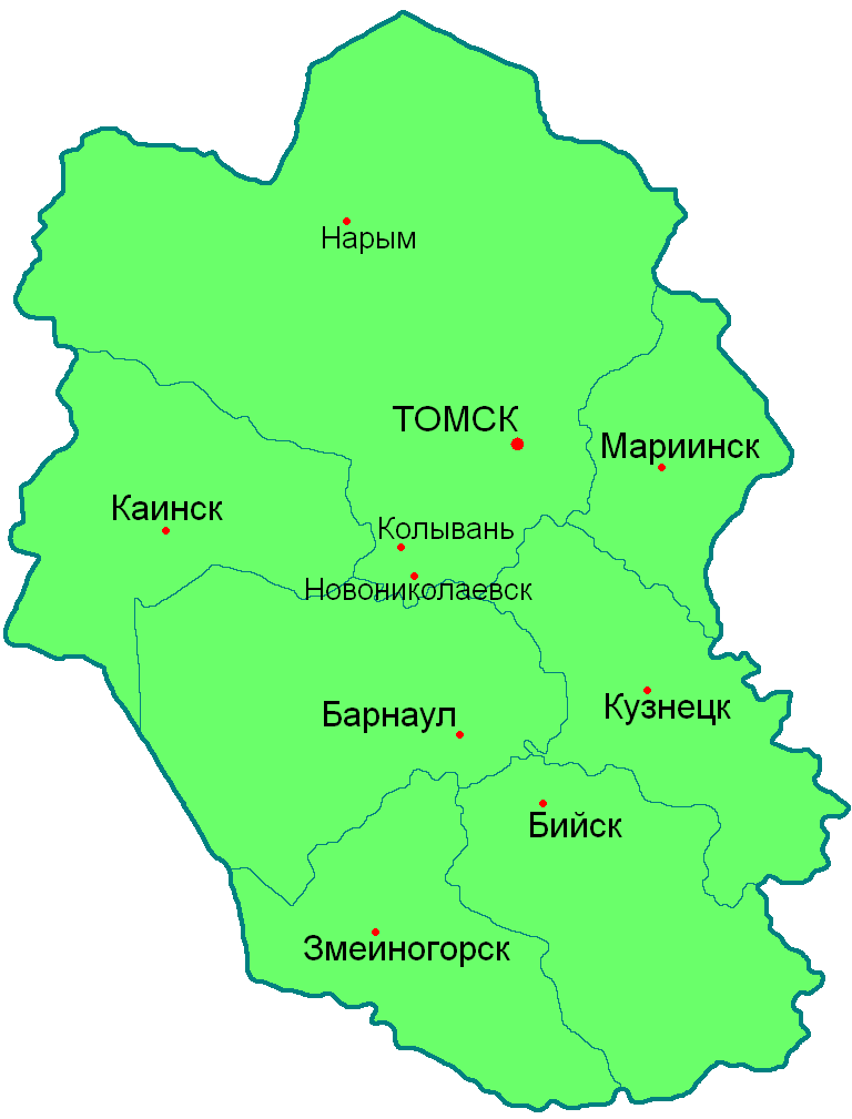 Административное деление Томской губернии